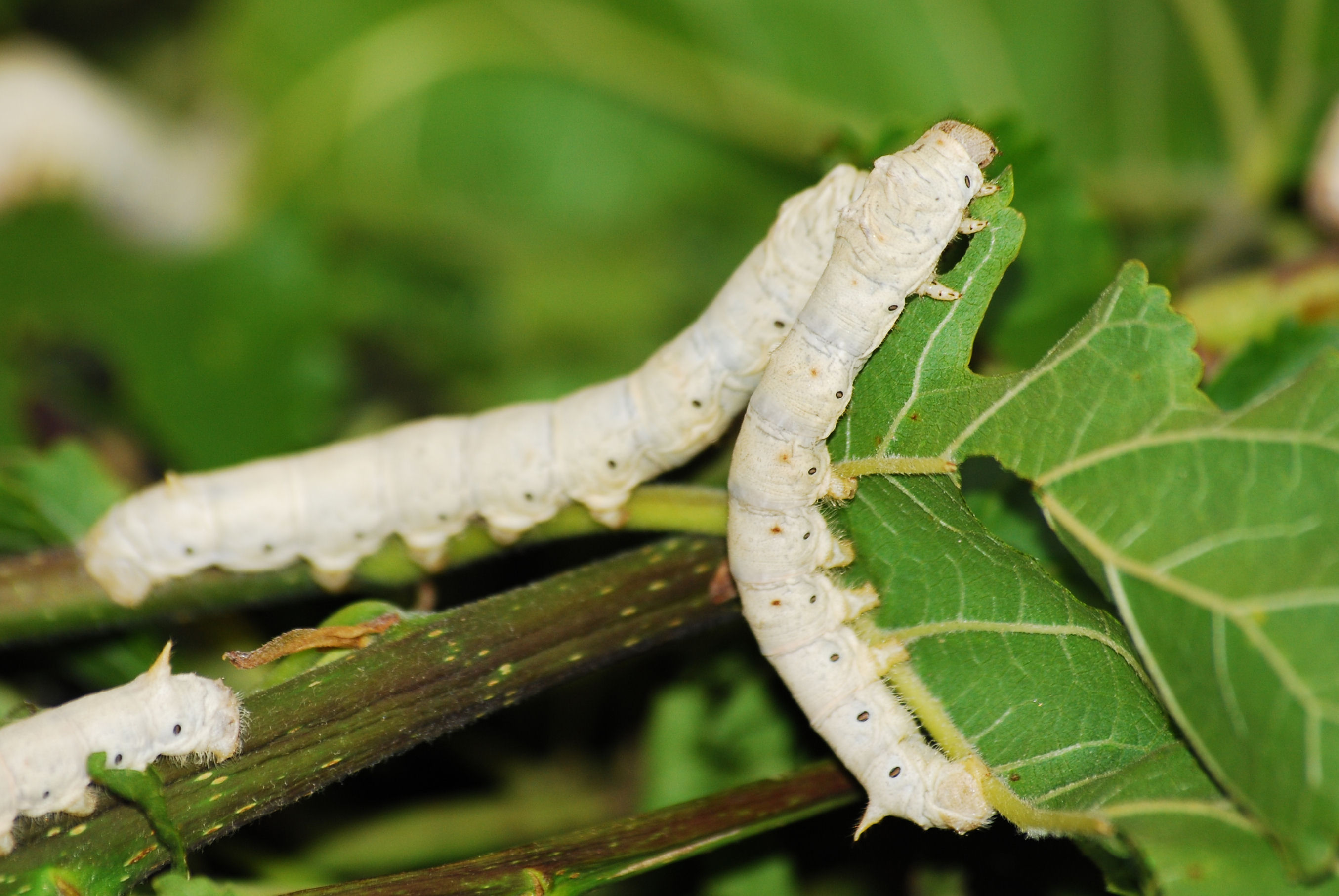 Bombyx mori (Larve) in Bornholms Sommerfugelpark & Tropeland